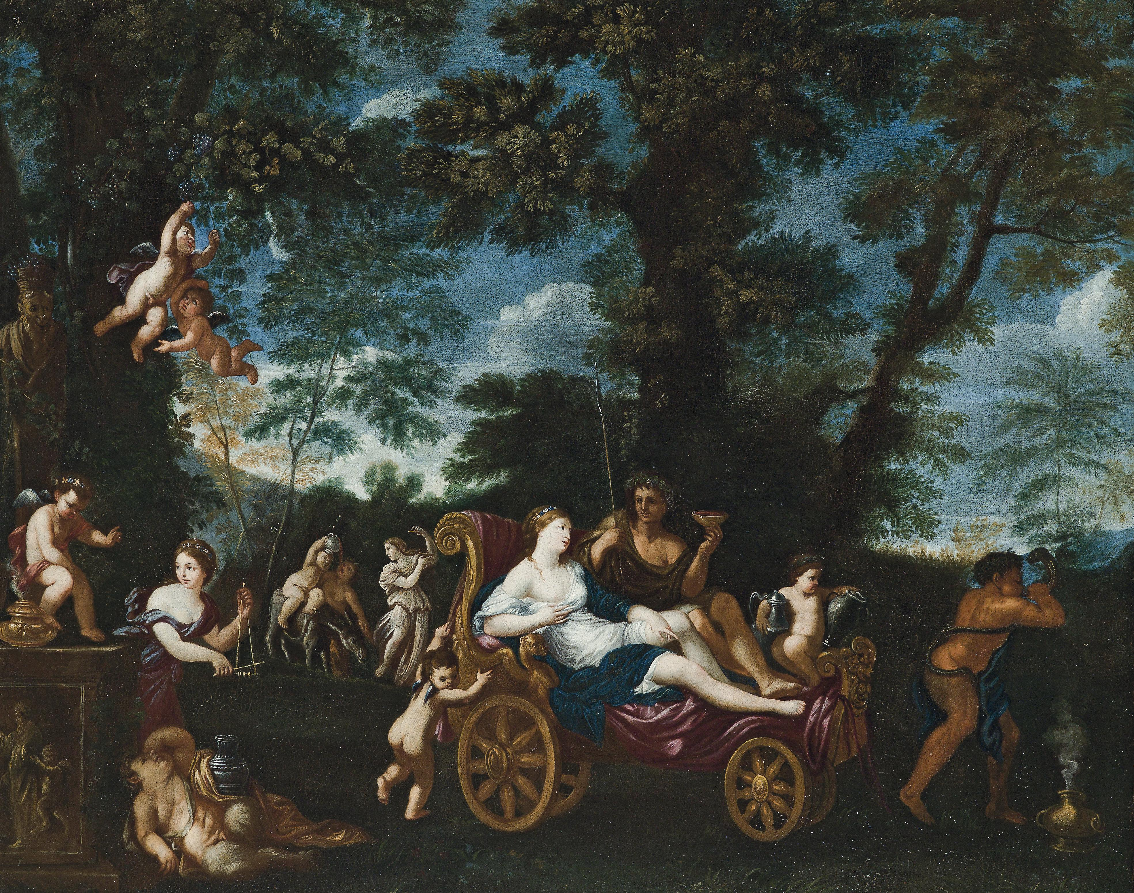 Bacchus und Ariadne